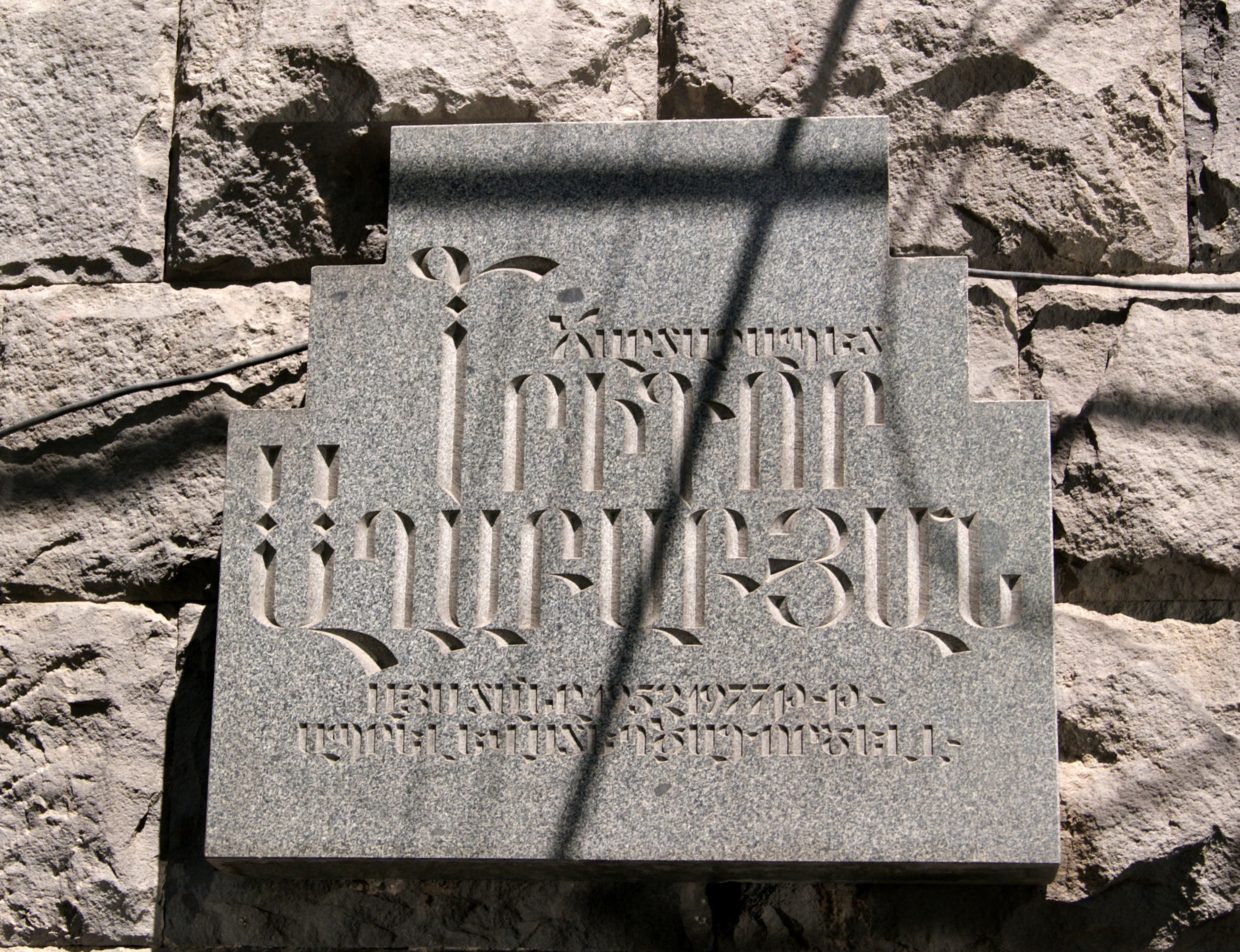 Grigor Aghababyan's plaque on Baghramyan avenue